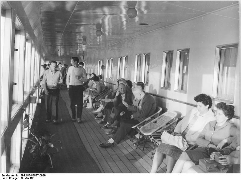 Zentralbild Krueger 9.5.1961 Erste Fahrt des FDGB-Urlauberschiffes "Fritz Heckert". Am 1. Mai 1961 ging das erste in der DDR gebaute Urlauberschiff "Fritz Heckert" von Wismar aus auf eine 12tägige Jungfernfahrt durch die Ostsee. UBz. Kleine Plauderstunde.